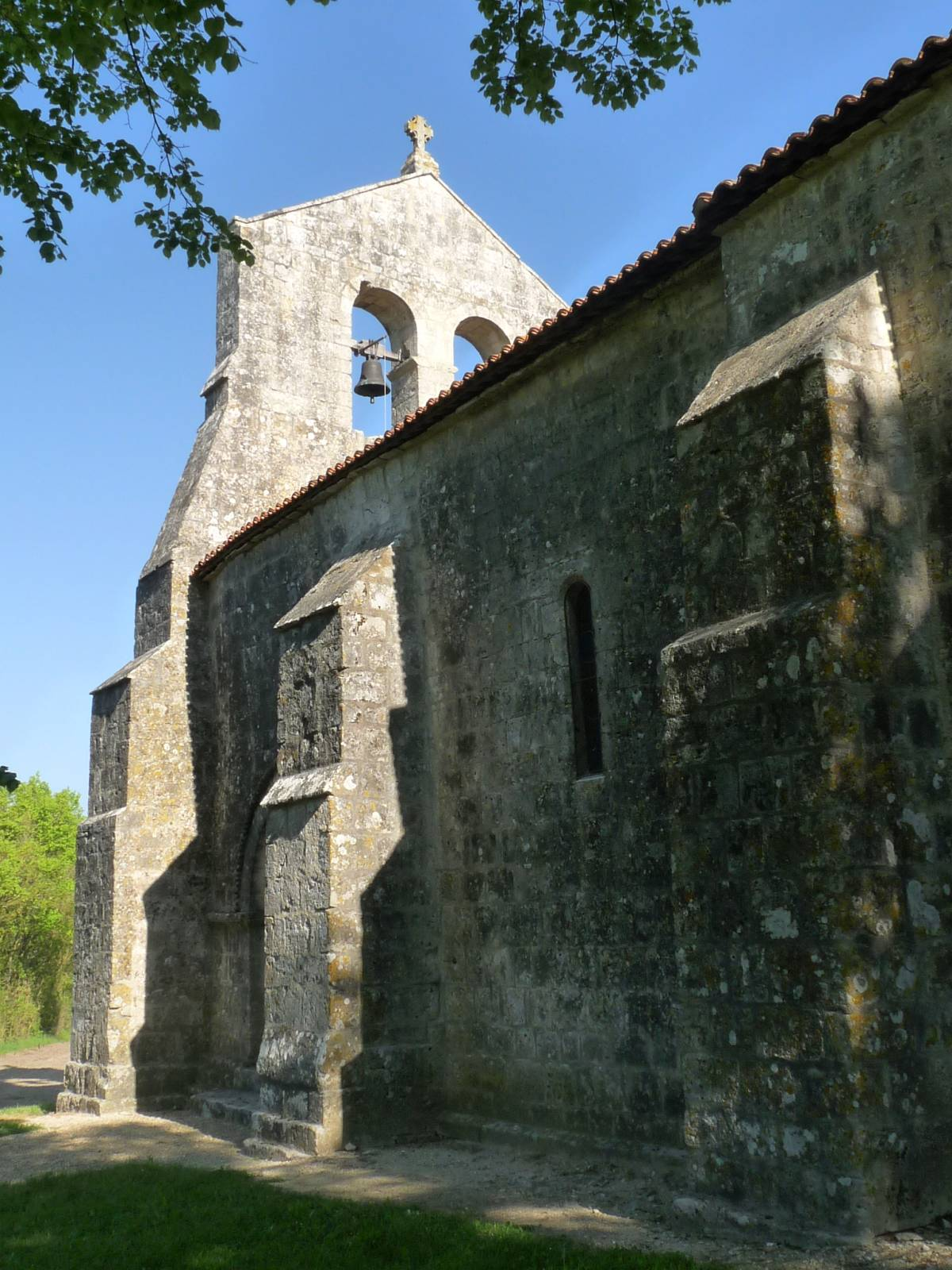 Eglise de Bonneville, Charente, France